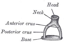 Stapes